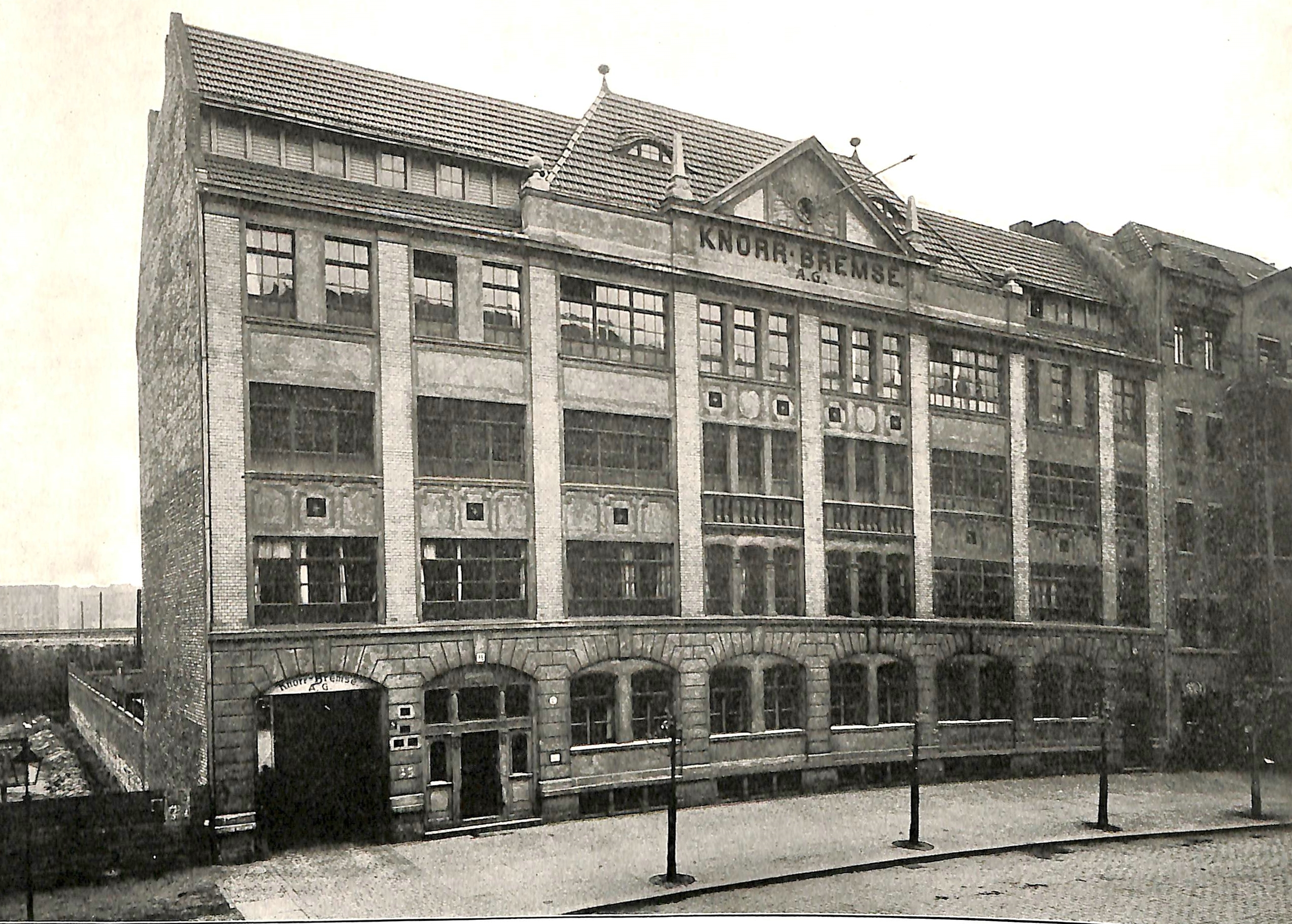 Berlin-Lichtenberg - Ansicht des Verwaltungsgebäudes der Knorr-Bremse AG.